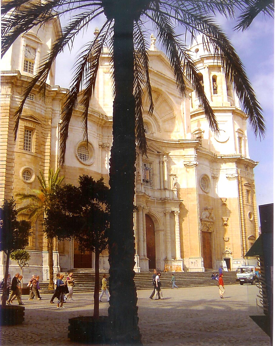 Cadiz.